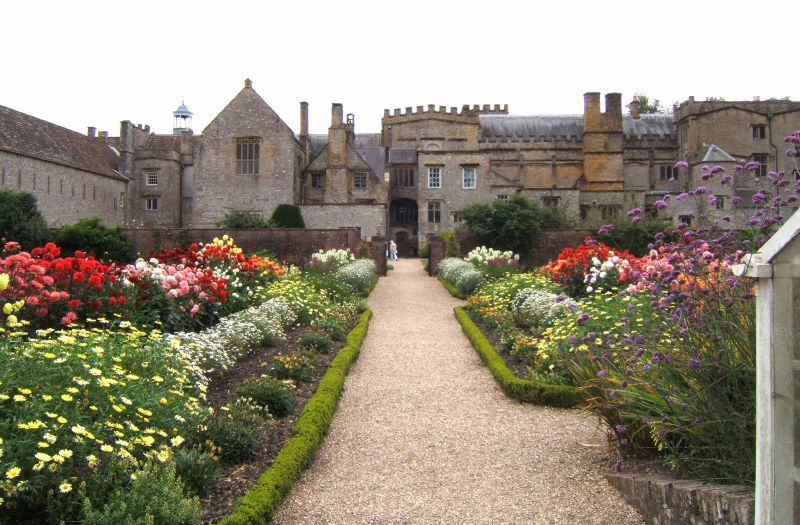 Forde Abbey